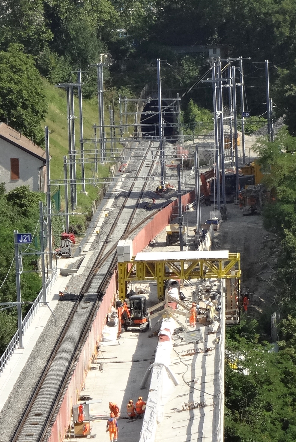 Travaux du viaduc de la Jonction. Passage piétonnier et cyclable reconstruit et élargi (de 1,45 à 3,70 m), distance de sécurité aux trains agrandie (de 19 à 120 cm), été 2017.